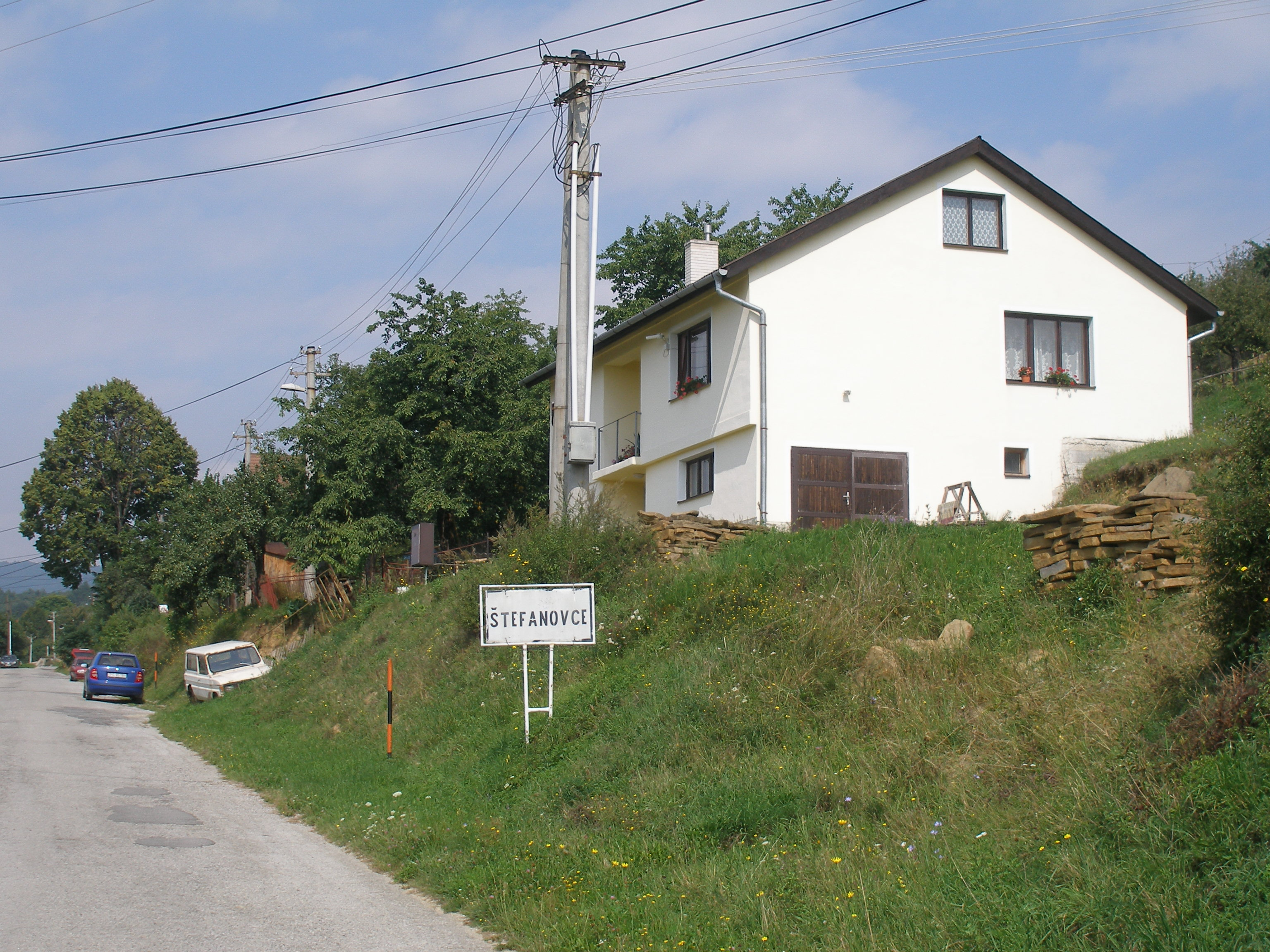 Šarišská obec Štefanovce